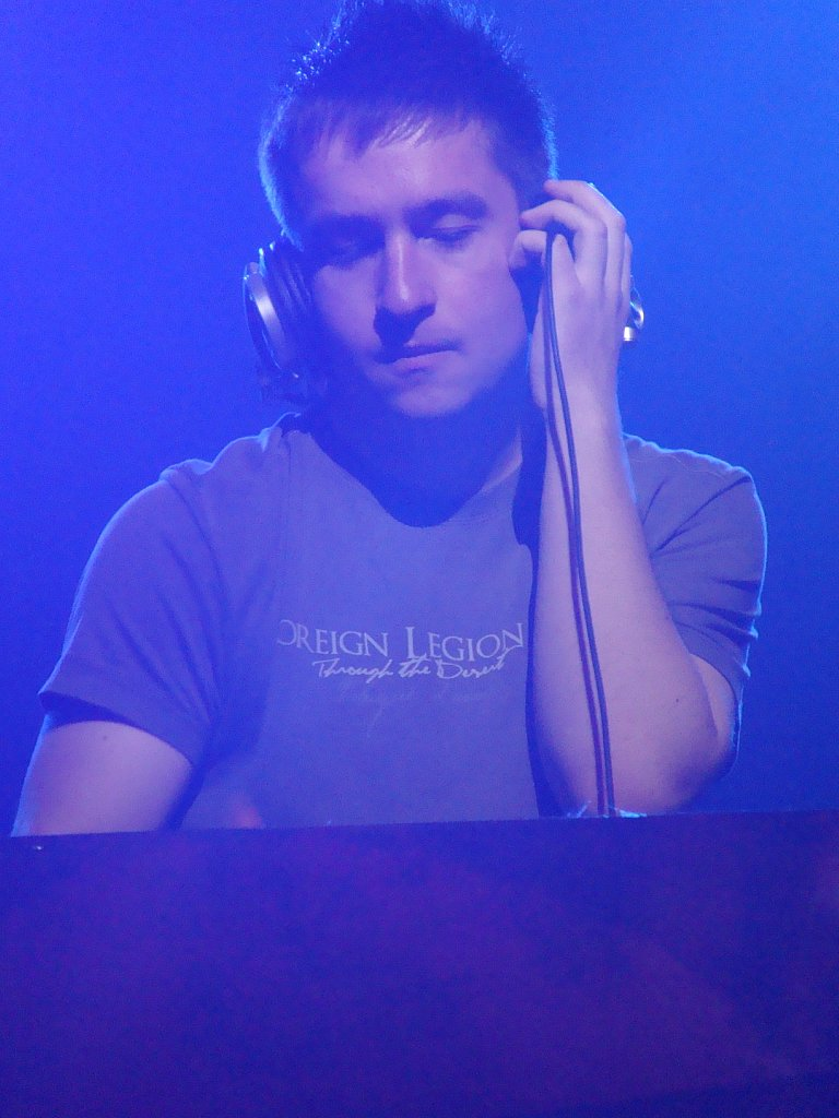 UCast performing his set at Crossfield 2009